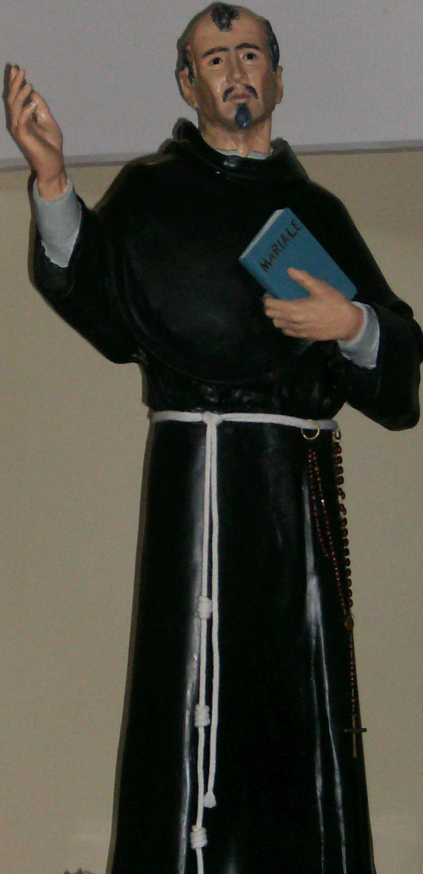 Simone De Troia, Statua di San Francesco Antonio Fasani venerata nella sua parrocchia a Lucera Licensing Categoria:Lucera